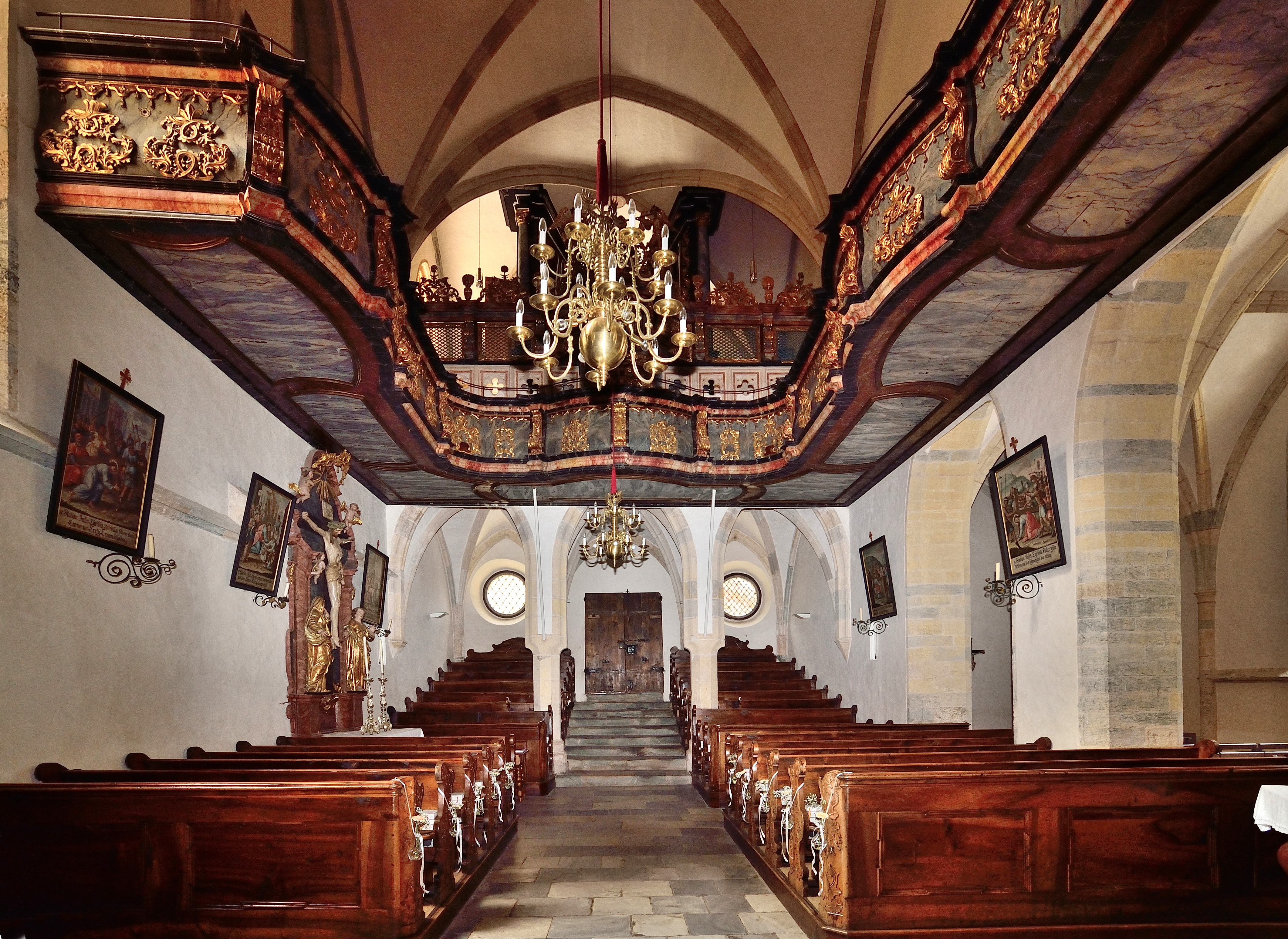 Die Pfarr- & Wallfahrtskirche St. Erhard in Sankt Erhard in der Breitenau, Gemeinde Breitenau am Hochlantsch, steht unter Denkmalschutz.